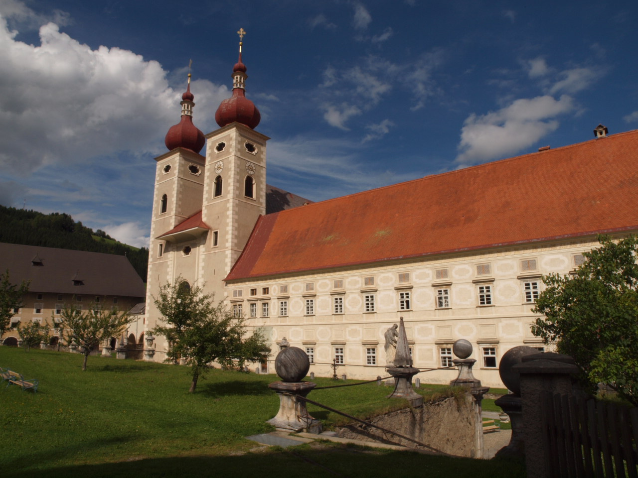 St.Lambrecht